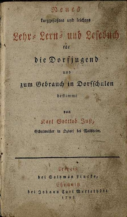 Carl Gottlob Just [1771-1826) war ein deutscher Pädagoge und Schulbuchautor. Er veröffentlichte unter anderem Neues kurzgefaßtes und leichtes Lehr-, Lern- und Lesebuch für die Dorfjugend und zum Gebrauch in Dorfschulen bestimmt. 1. Auflage Leipzig 1798, 2. Auflage Leipzig/Chemnitz 1799, 3. Auflage Jena 1806. Hier das Titelblatt der ersten Auflage, Digitalisat der in der Göttinger Staats- und Universitätsbibliothek [1]